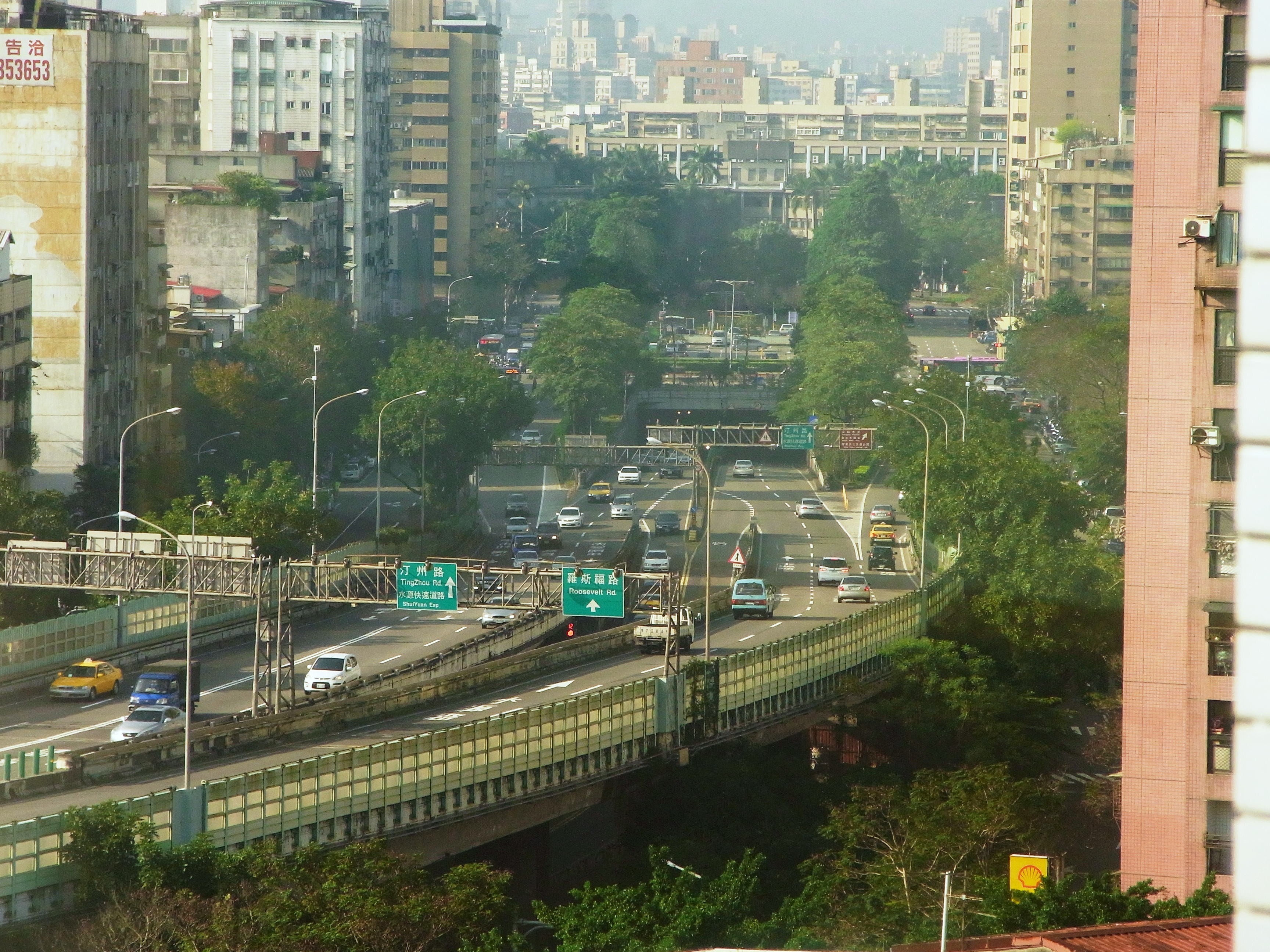 中文（台灣）: 台北市大安區辛亥路一段、羅斯福路三段路口。